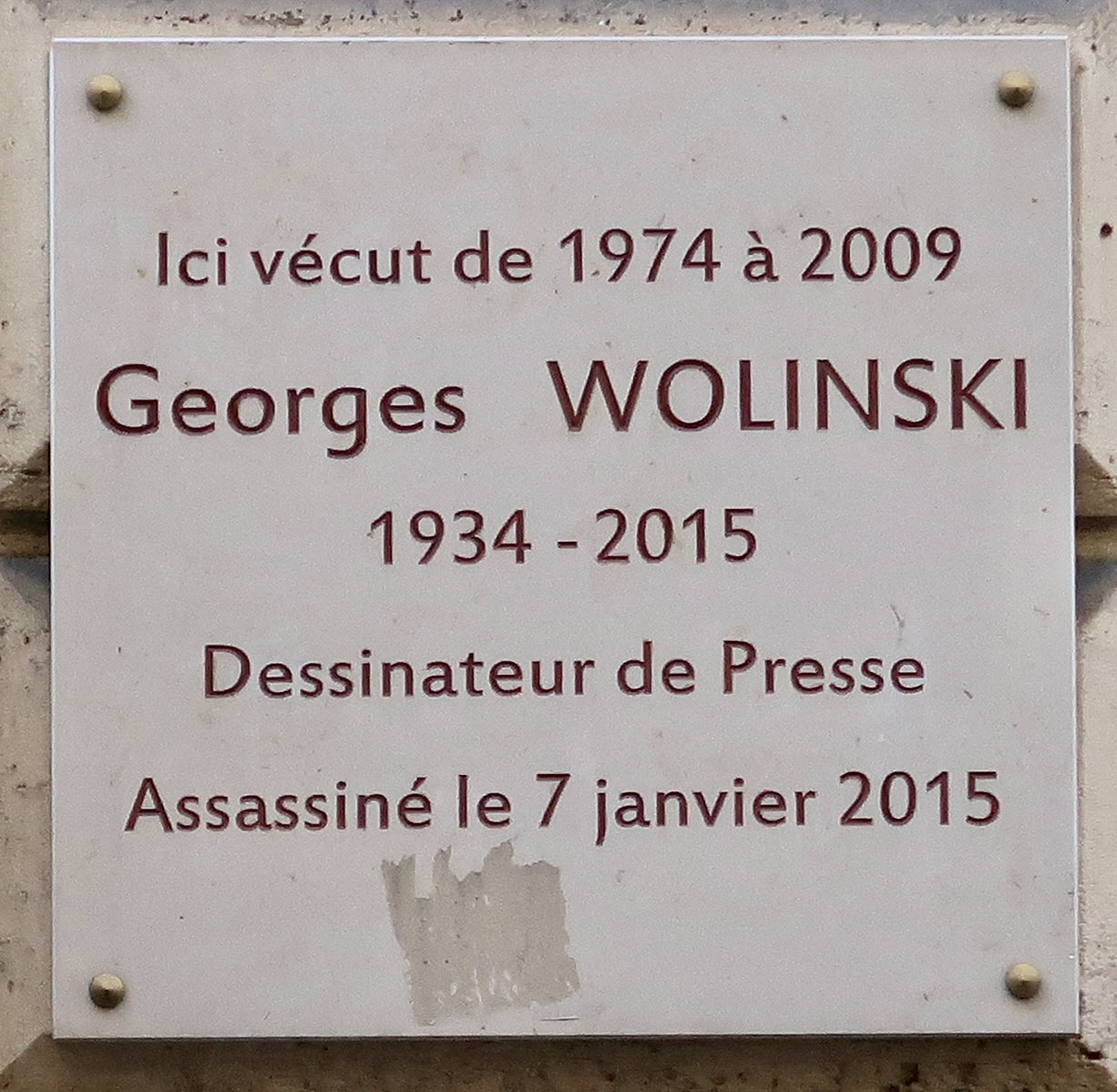 Plaque en hommage à Georges Wolinski, 34 rue Bonaparte (Paris, 6e).